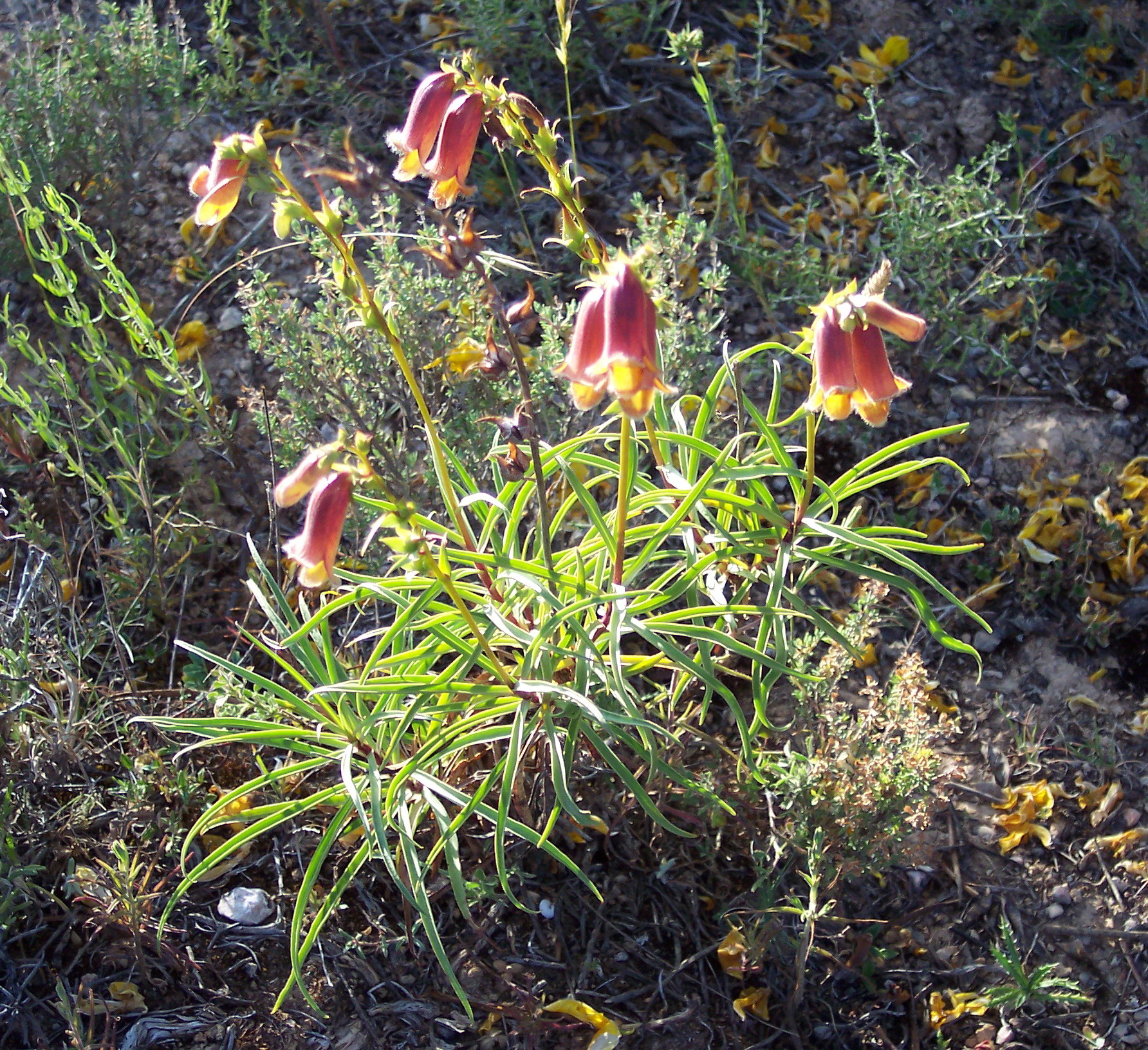 Digitalis obscura. Olivares de Júcar, Cuenca, España.